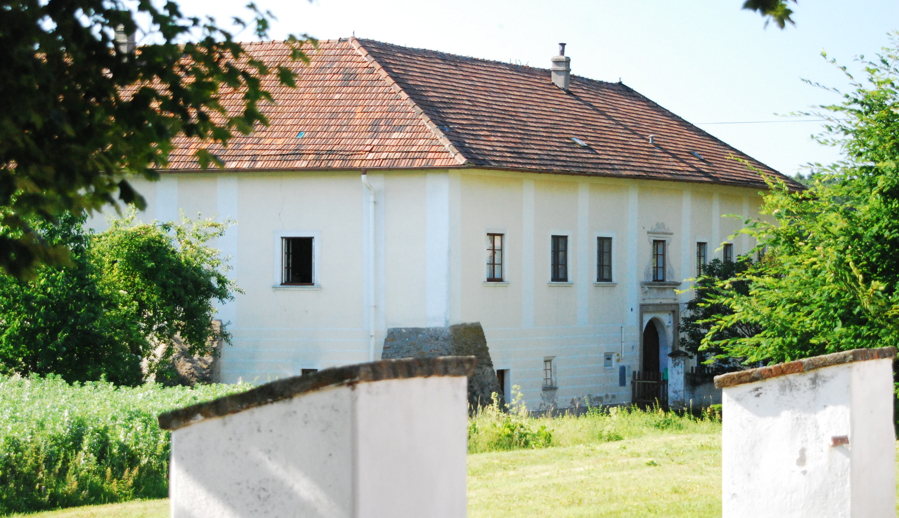 Schloss Wisent in Amelsdorf in Niederösterreich